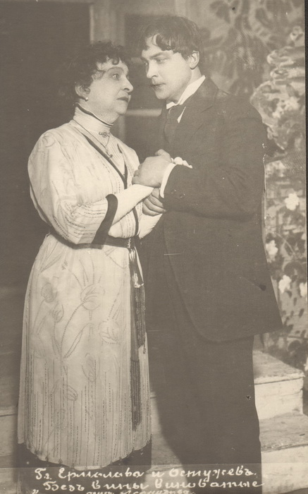 Малый театр "Без вины виноватые": М. Н. Ермолова в роли Кручининой, А. А. Остужев в роли Незнамова